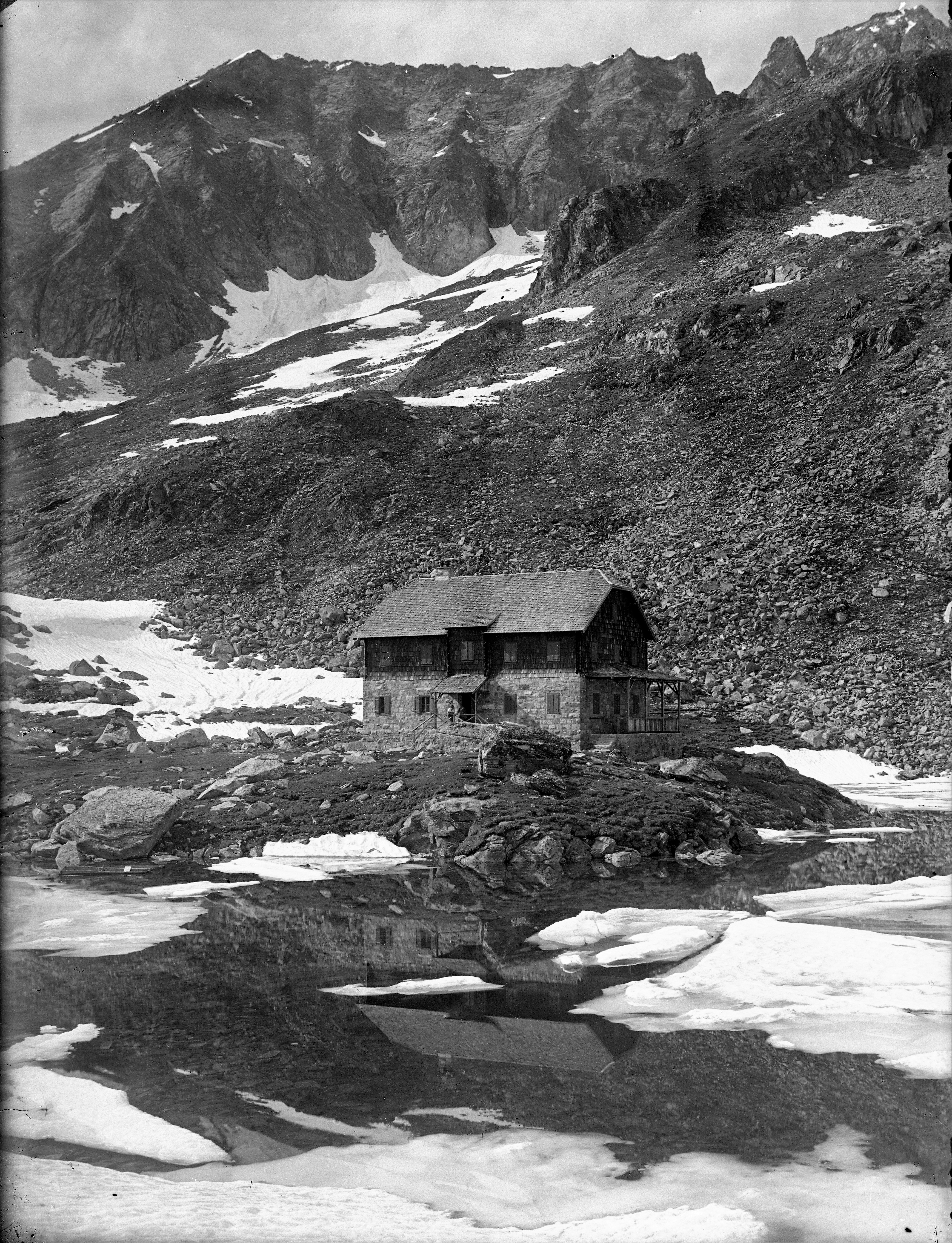 Arthur-von-Schmid-Haus am Doesenersee, Mallnitz, Ankogel Sortiment, Hohe Tauern, Kärnten, Österreich